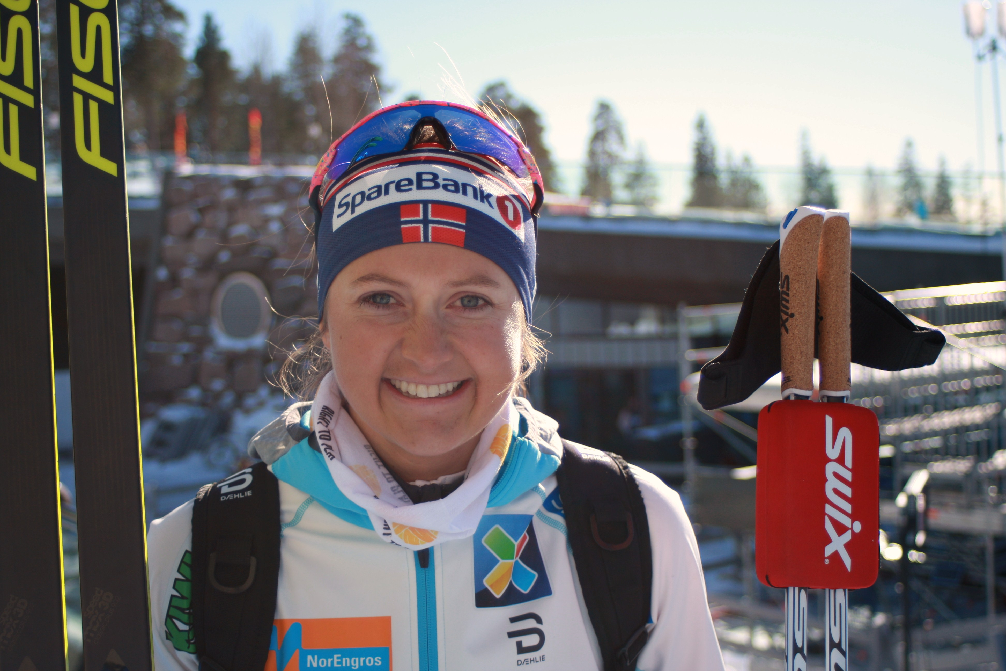 Holmenkollen, Oslo, 10.03.2019